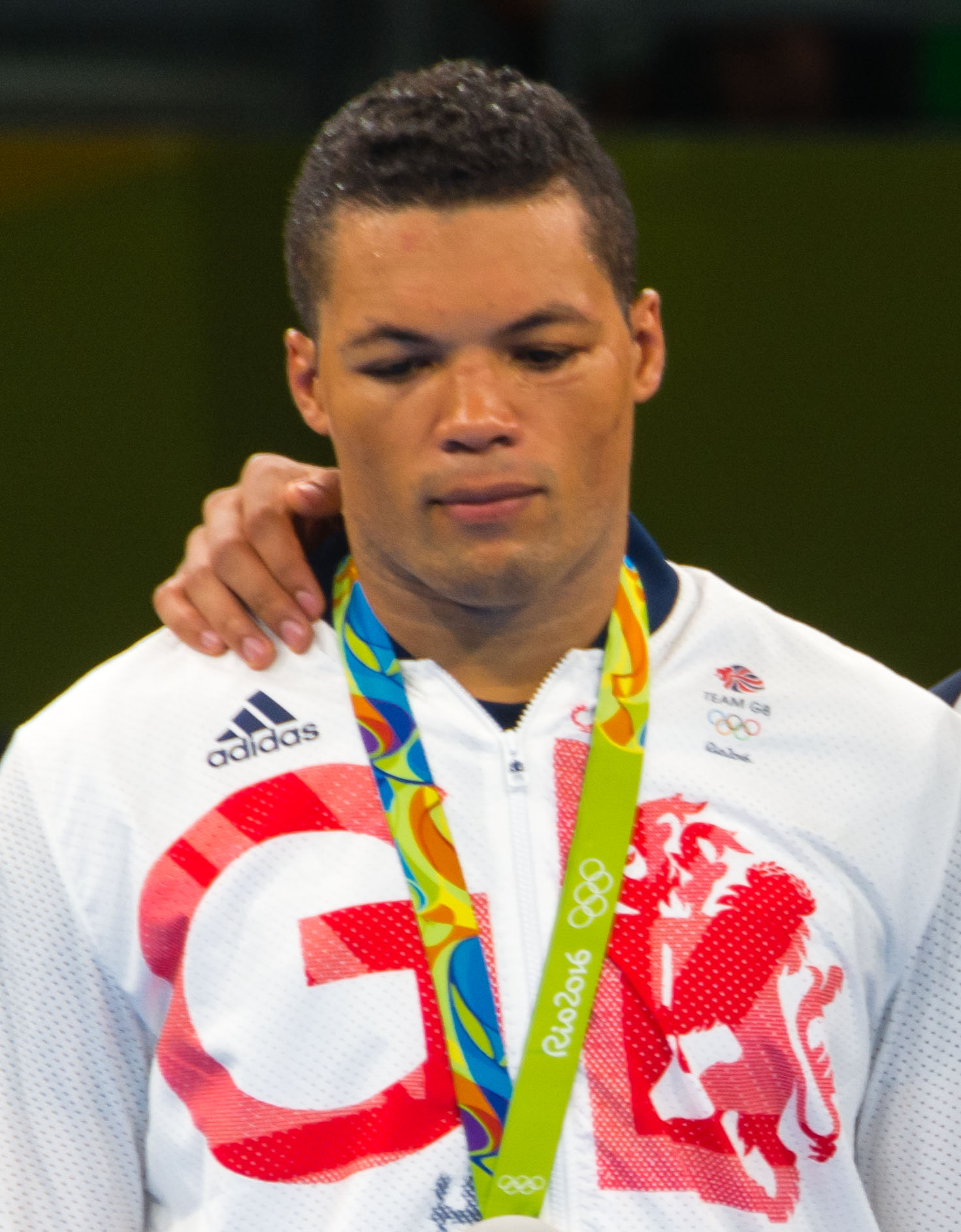 Pódio da categoria peso superpesado acima de 91kg masculino, Jogos Olímpicos Rio 2016. Ouro: Tony Victor James Yoka/FRA. Prata: Joe Joyce/GBR. Bronzes: Filip Hrgovic/CRO e Ivan Dychko/KAZ.